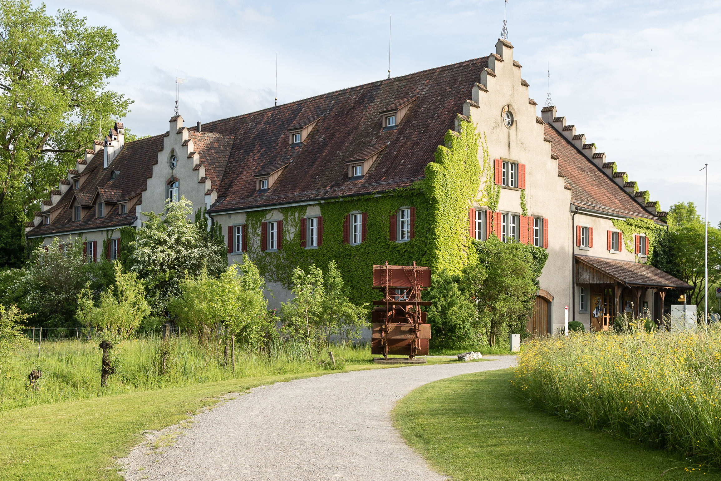 Seemuseum, ehem. Kornhaus von 1680